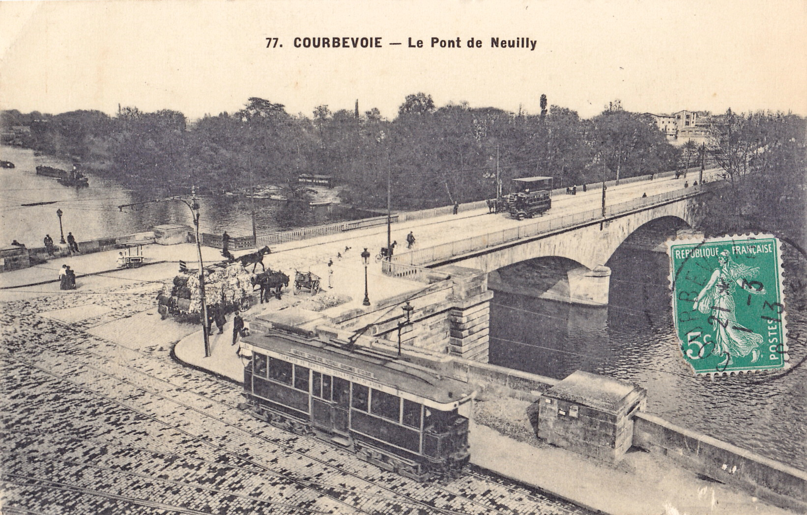 carte postale ancienne sans mention d'éditeur, n°77:COURBEVOIE - Le Pont de Neuilly